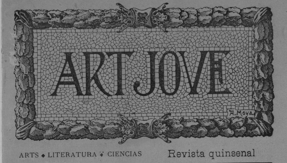 Portada d'Art Jove